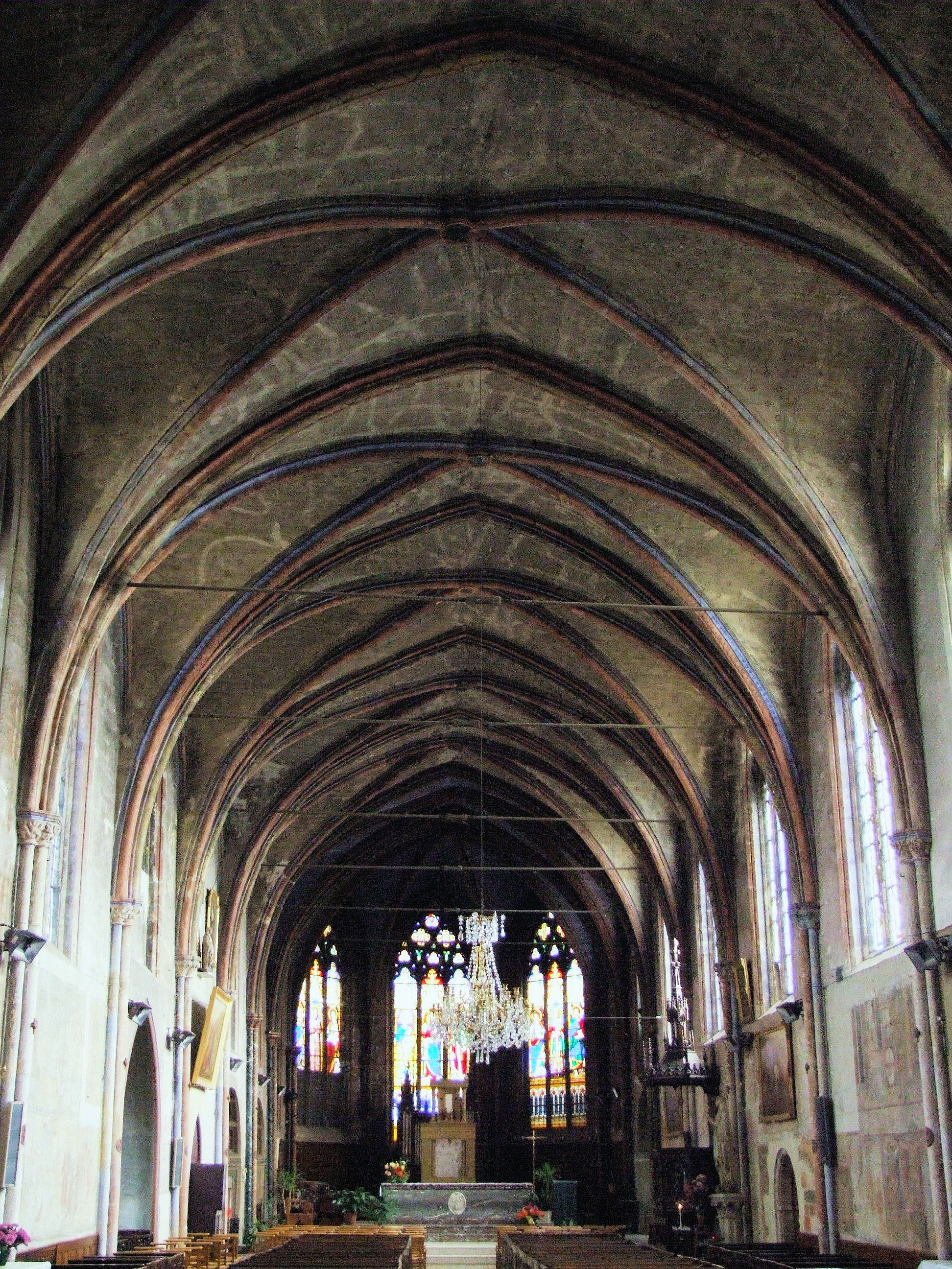 Bar-le-Duc - Eglise Saint-Antoine